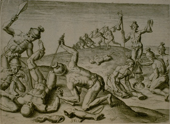 Au premier plan à gauche, trois Indiens ont scalpé un ennemi mort; l'un découpe les muscles de son bras gauche, un deuxième frappe sa jambe gauche, tandis qu'un troisième introduit une flèche dans son anus. Au second plan à droite, quatre Indiens travaillent auprès d'un feu pour faire sécher le scalp; un quatrième brandit un scalp.